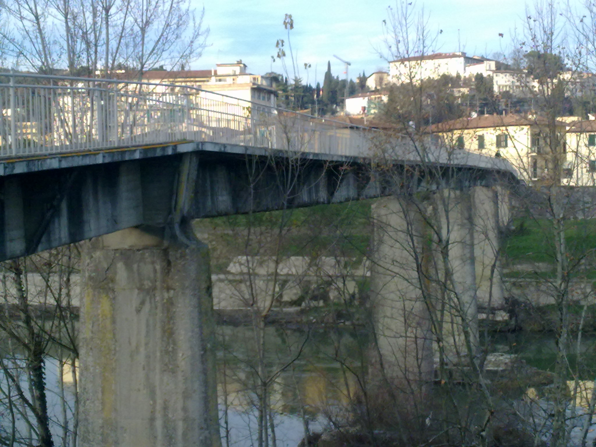 Passerella sull'Arno che unisce i comuni di Lastra a Signa e Signa.